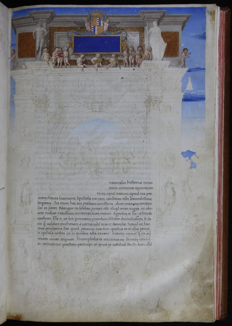 Orla arquitectònica composta per un arc de triomf, del qual únicament està il·luminat l'àtic, coronat per l'escut reial de Nàpols